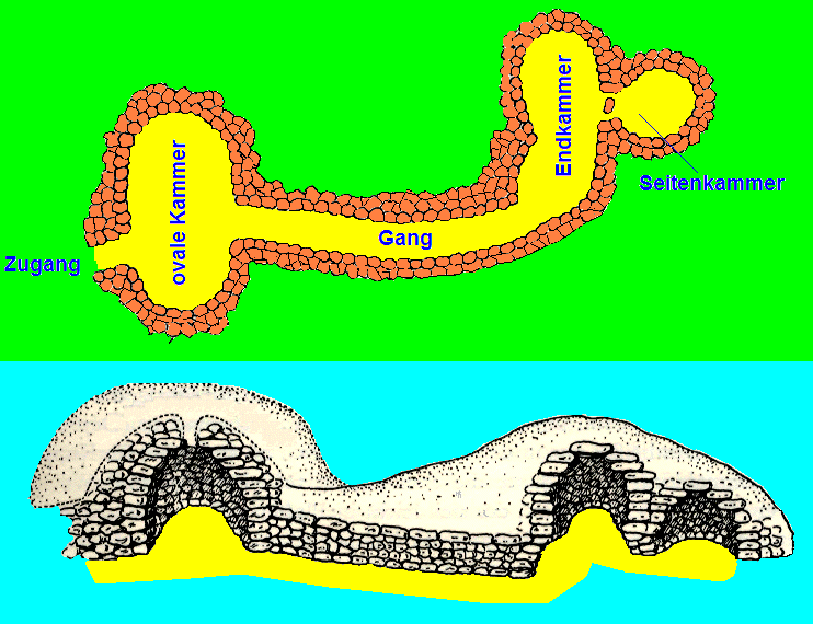 Kuppelbau